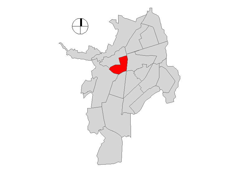 Comuna 9 de Santiago de Cali, Colombia.